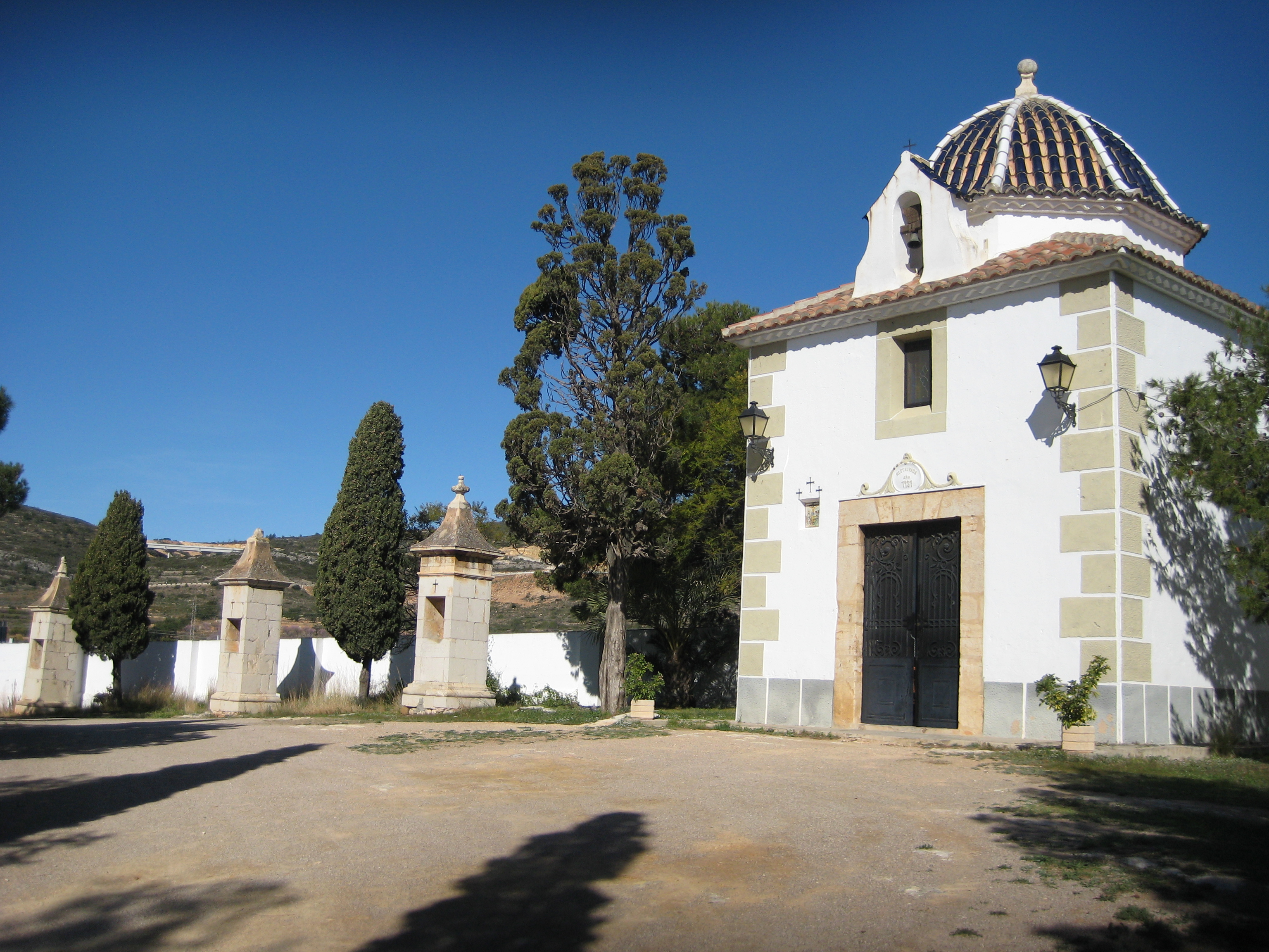 Ermita del Calvari de Torreblanca (Plana Alta)